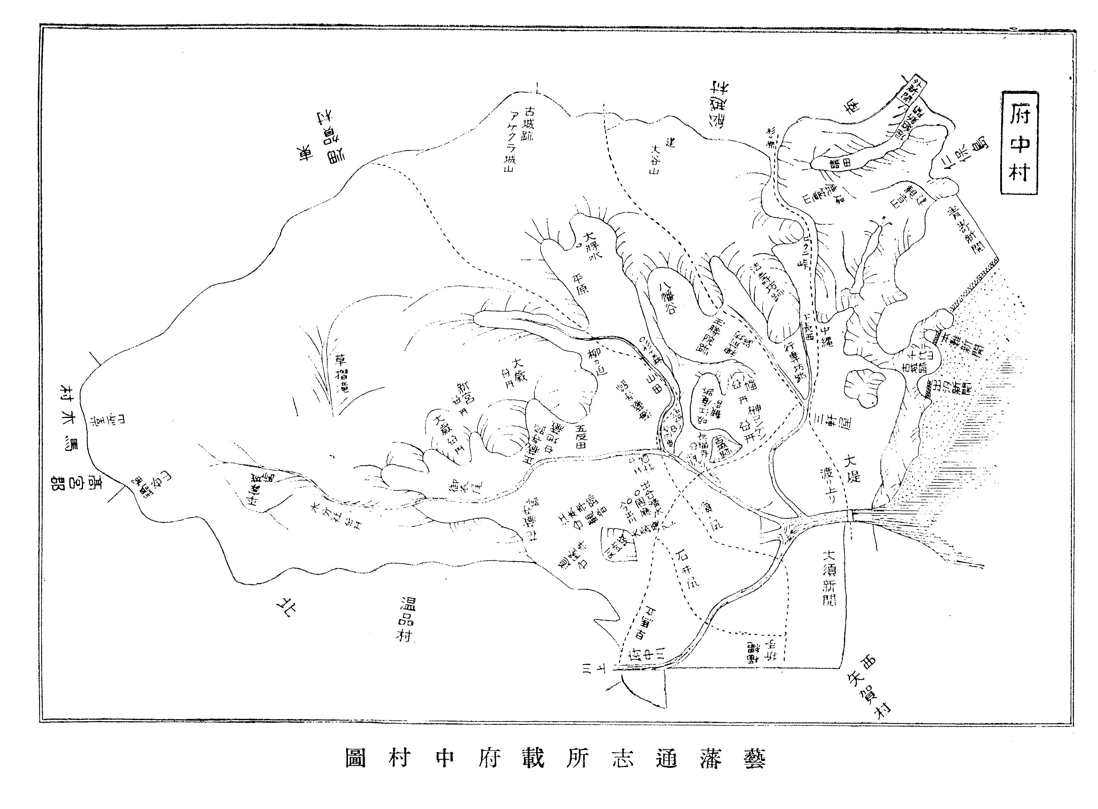 芸藩通志、府中村近辺の地図